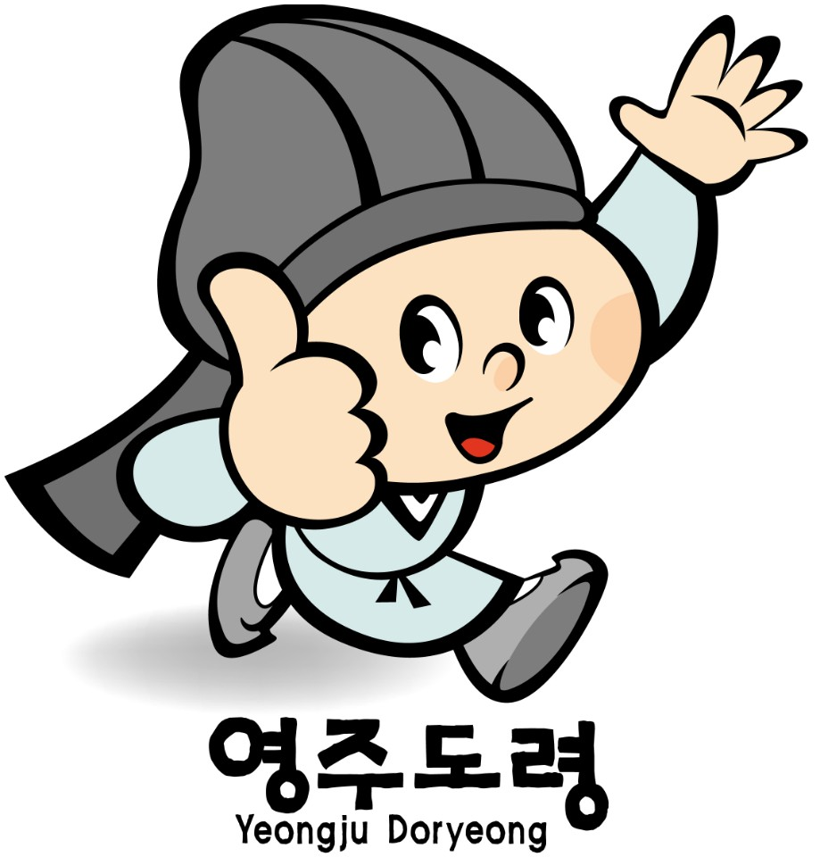 영주시의 캐릭터 '영주도령'의 모습이다.